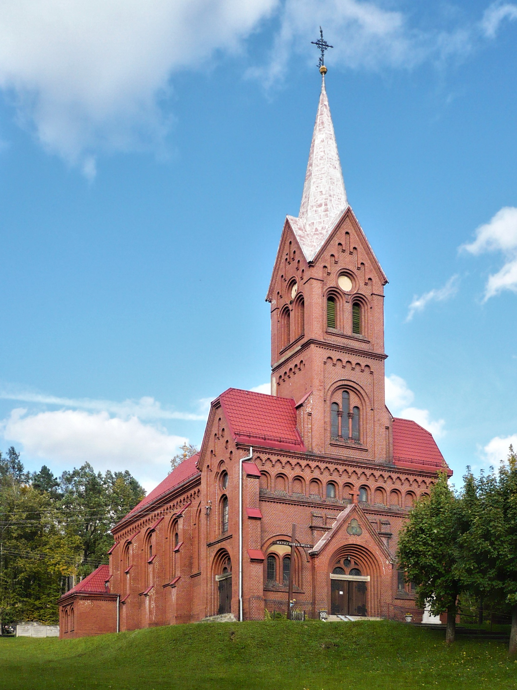 Kościół w Podlesiu